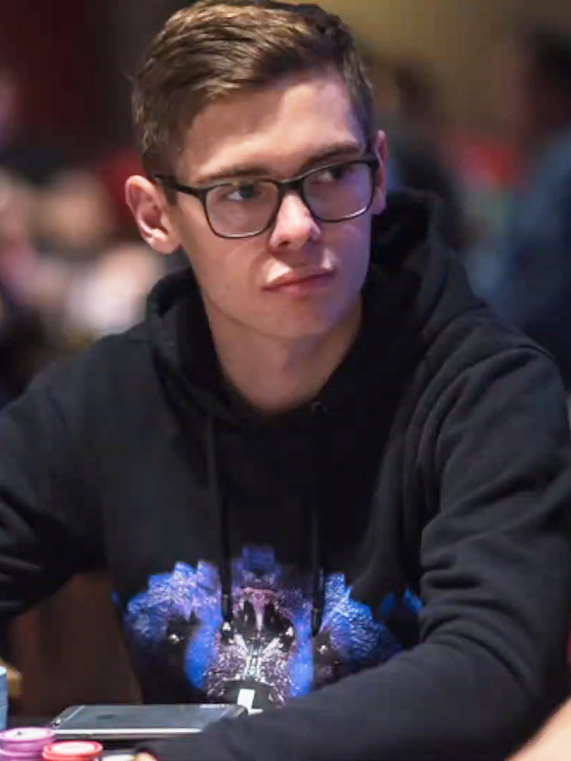 Fedor Holz bei der WPT Wien